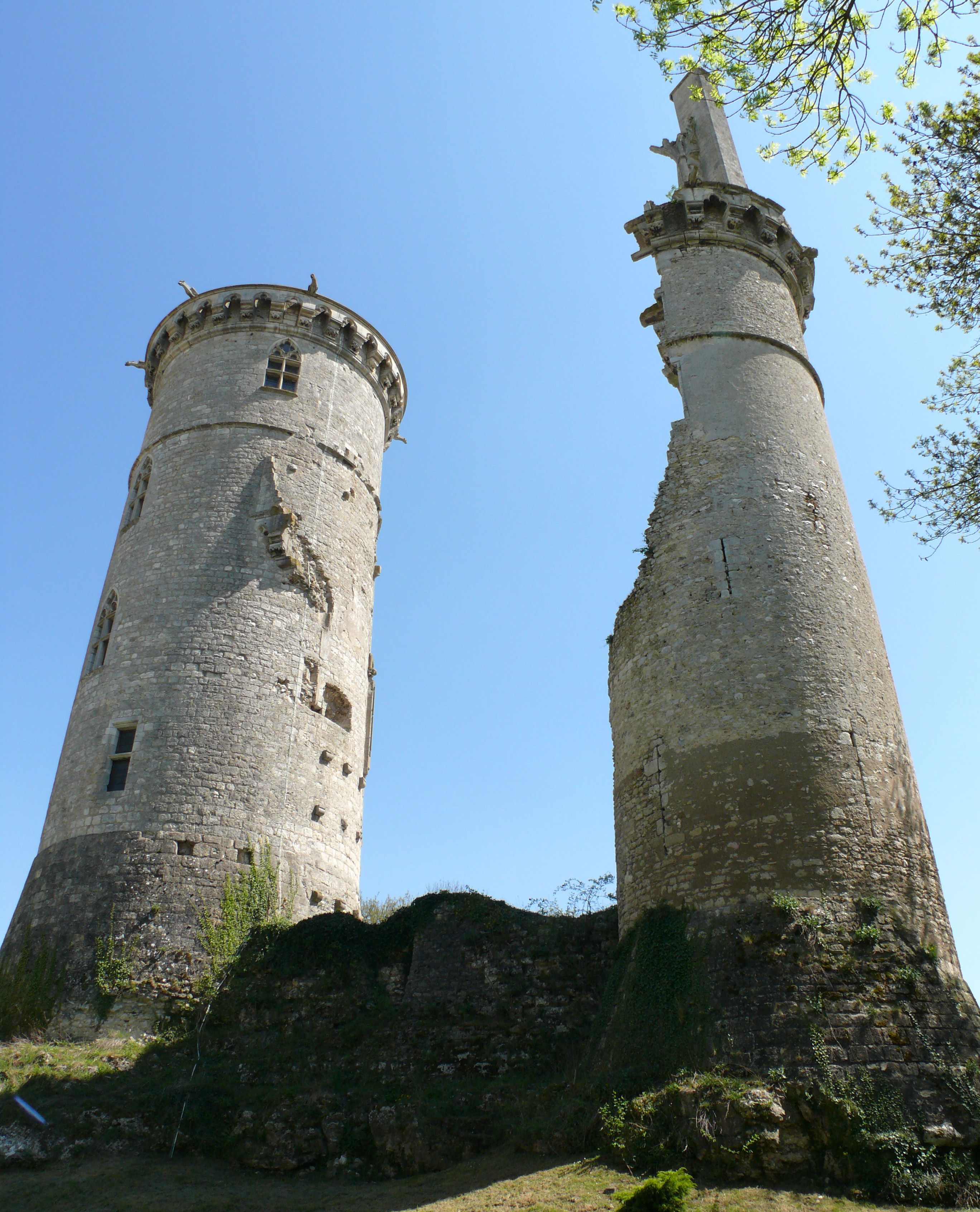 Château de Mehun-sur-Yèvre